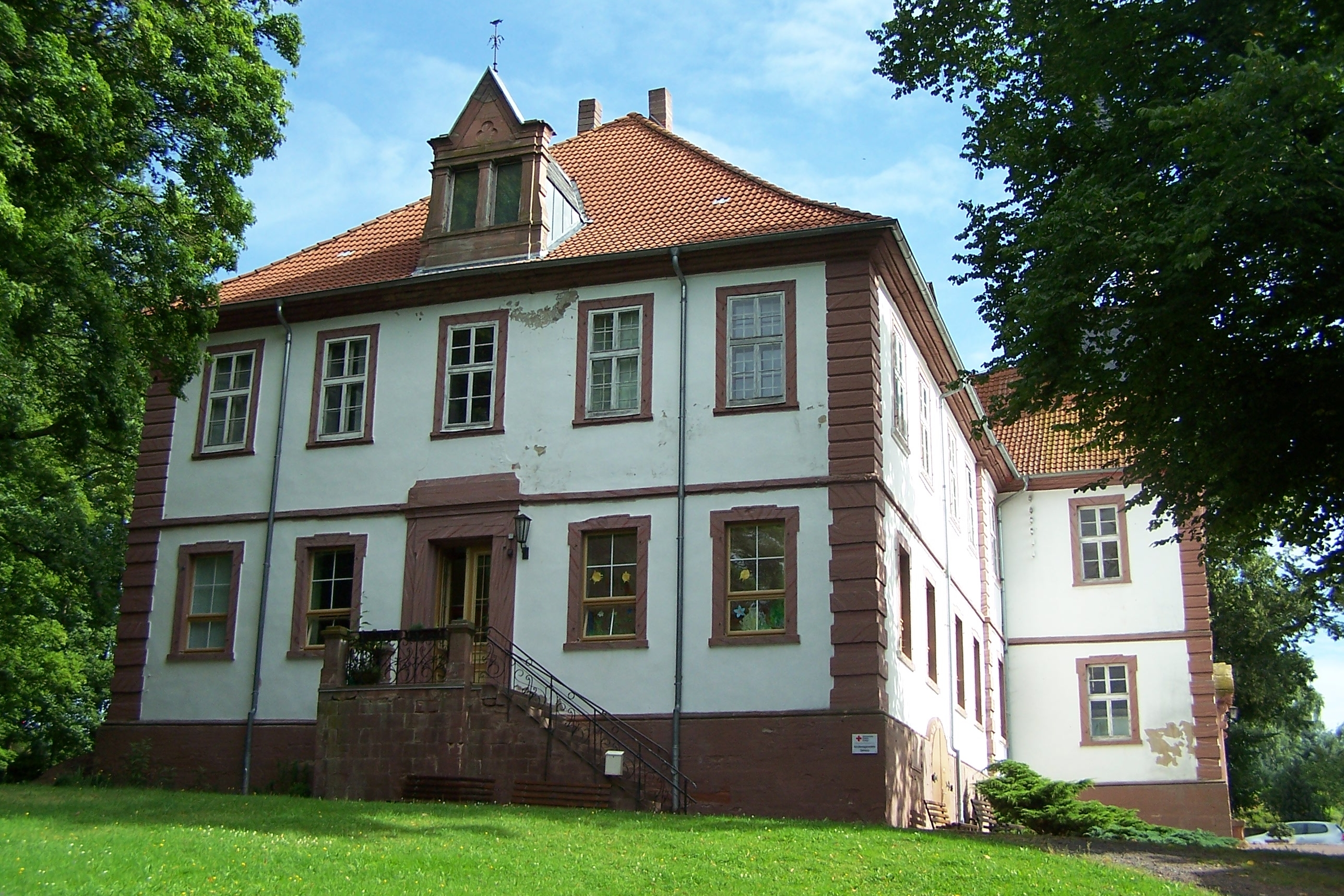 Ansichten und Details zum Oberen Schloss in Gehaus.